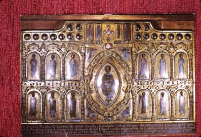 Aralarko San Migel santutegian dagoen XII. mendeko erretaula esmaltatua. Uharte-Arakil. Nafarroa, Euskal Herria.